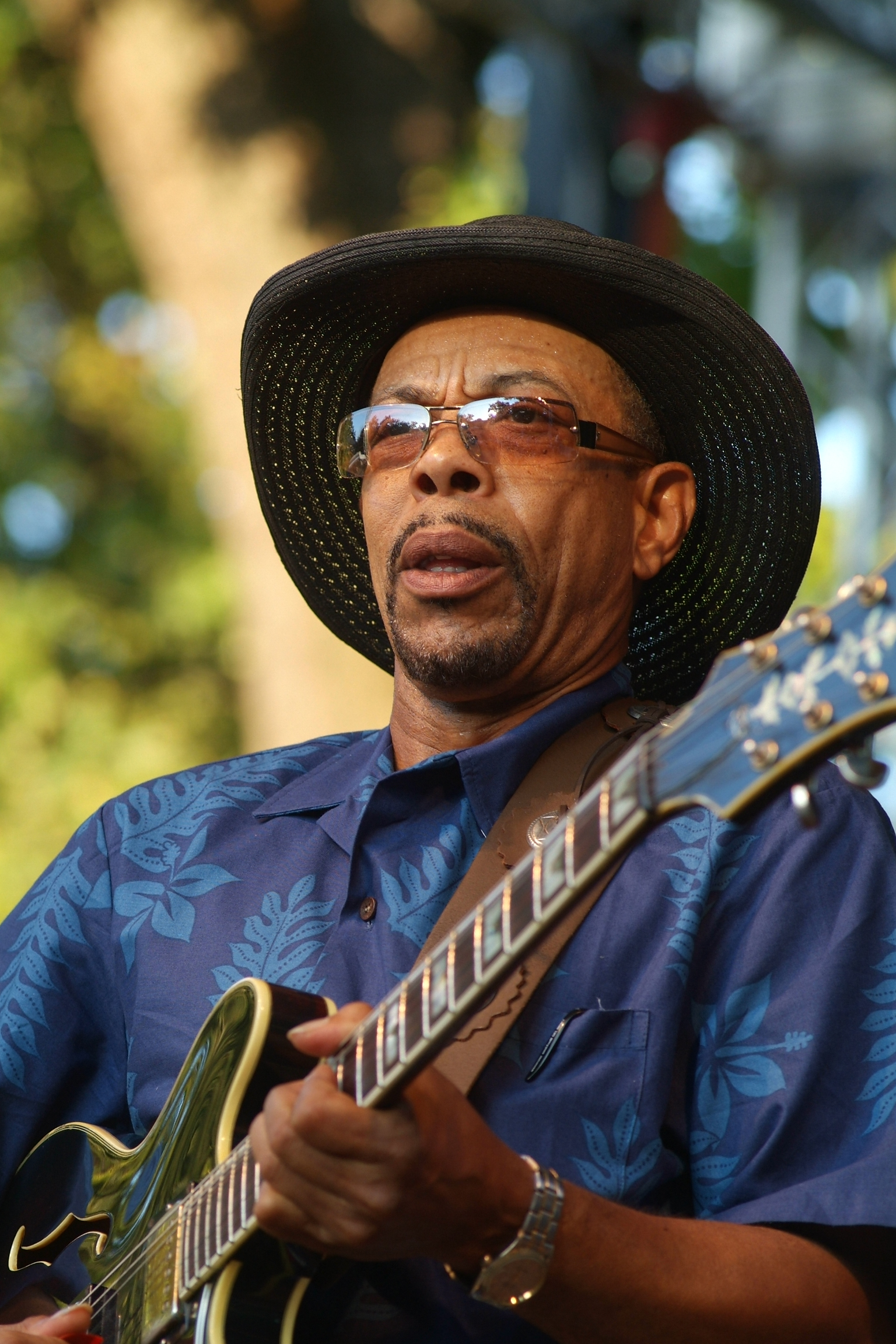 Mr Jonh Primer